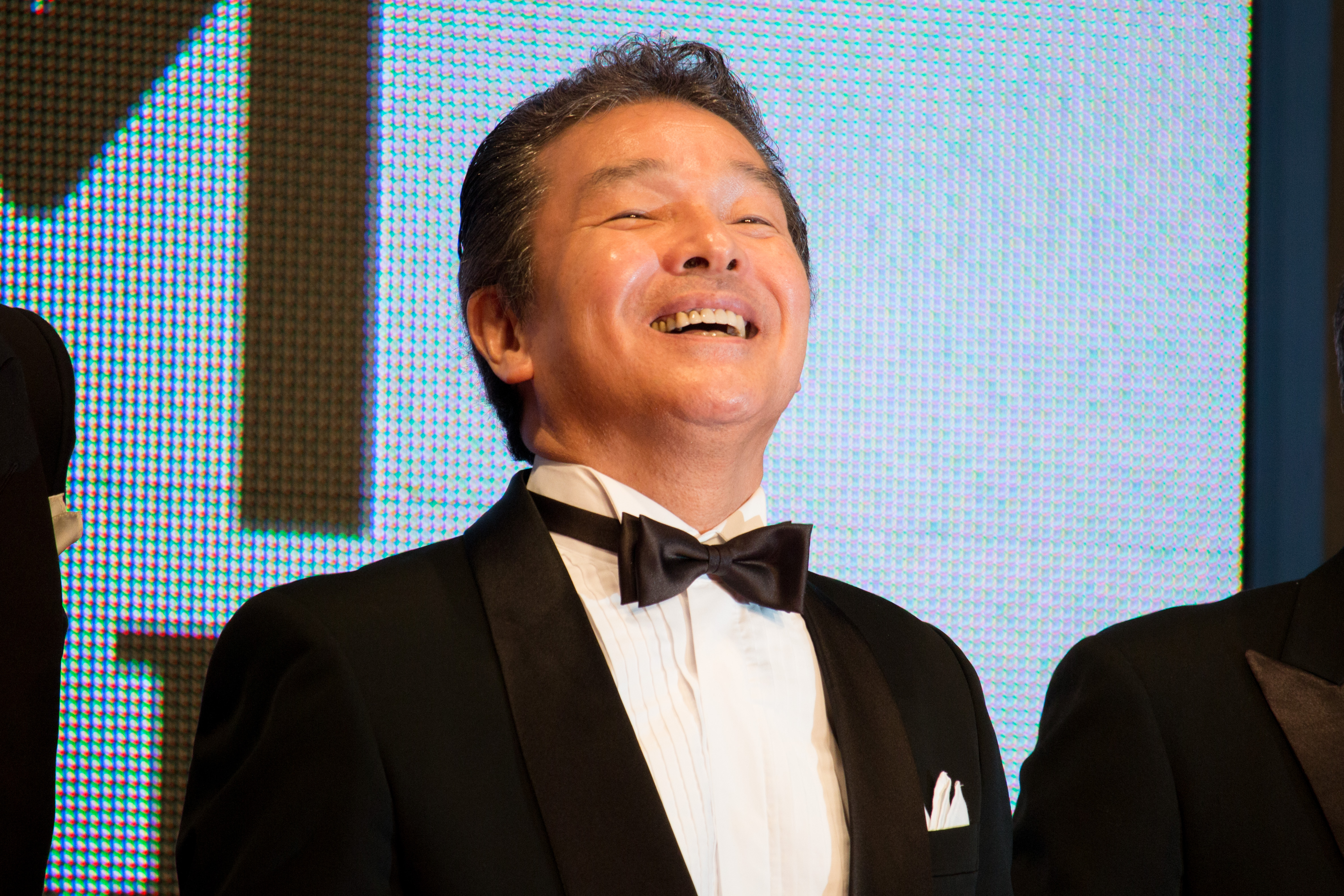 第28回 東京国際映画祭 オープニングセレモニー 尾藤イサオ (の・ようなもの のようなもの)